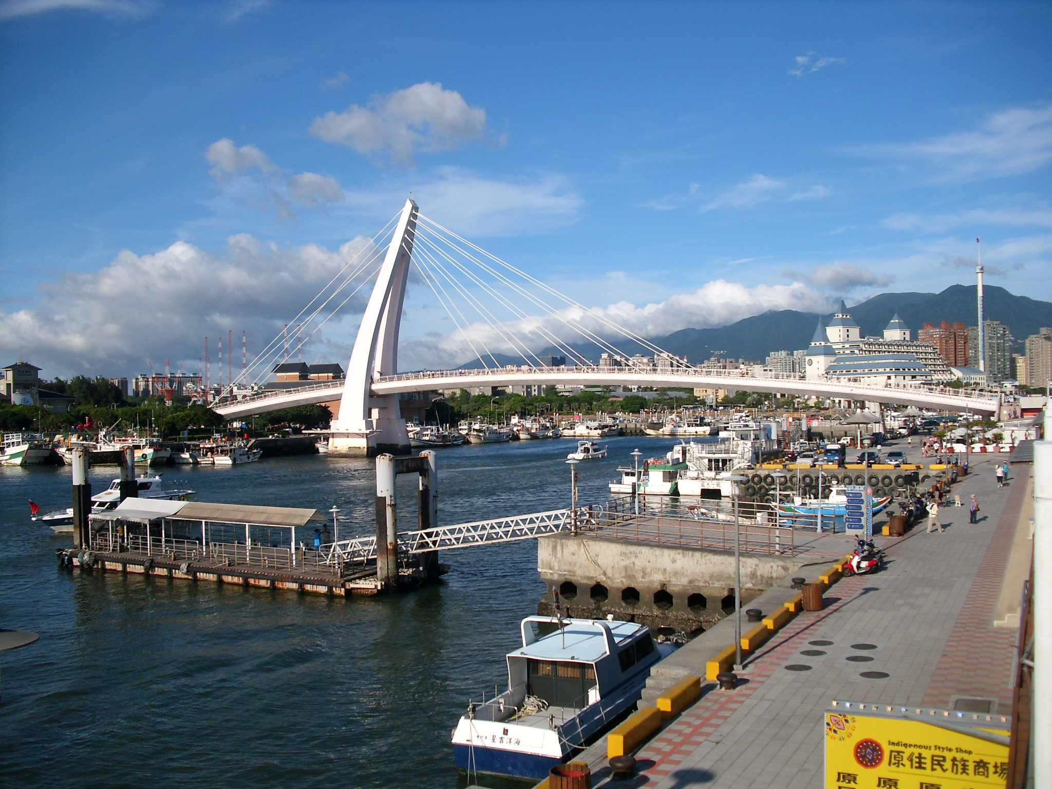 Bân-lâm-gú: 淡水第二漁港